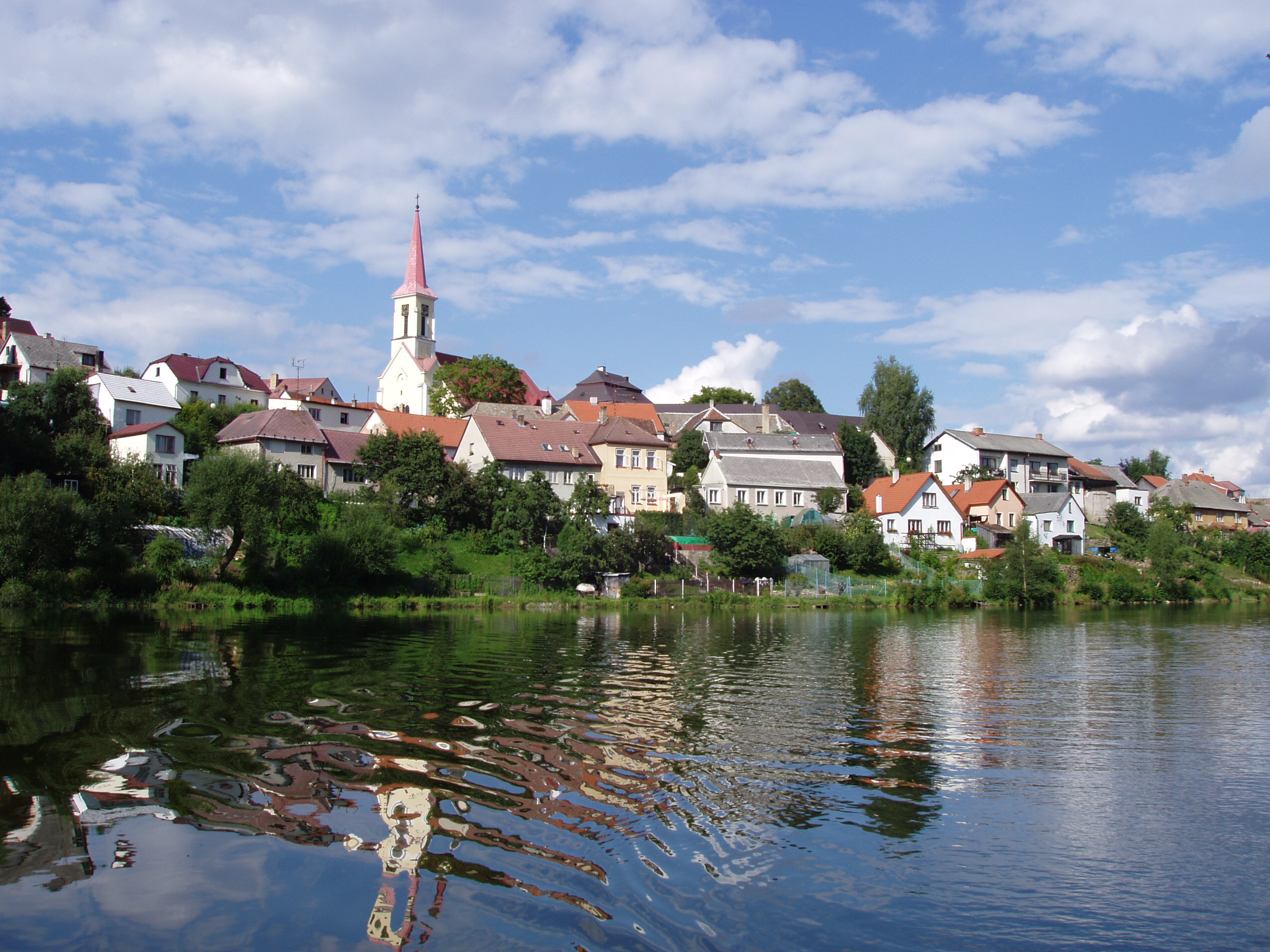 Kostel a Podhradí (Church and "Undercastle")